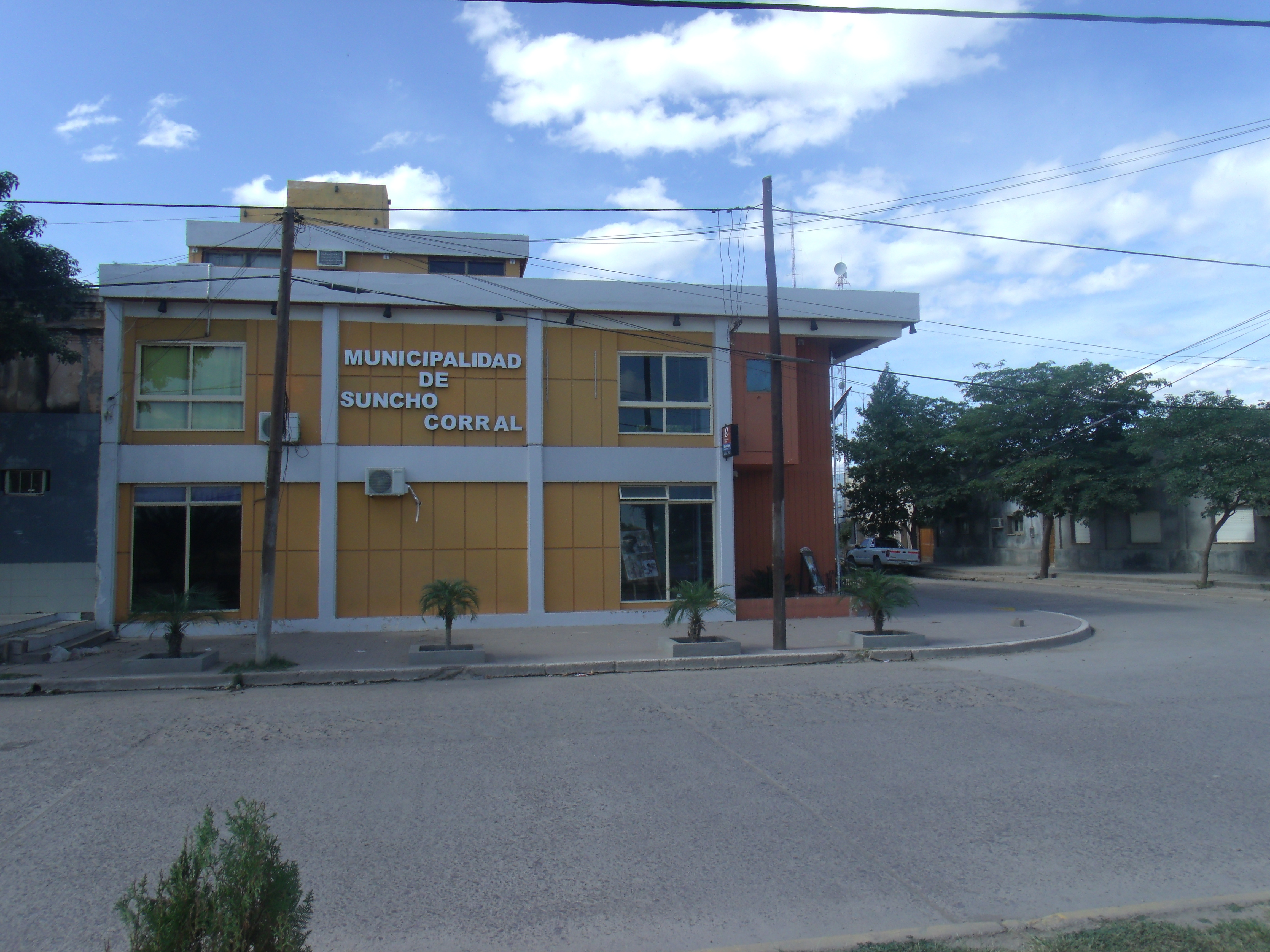 Sede de la Municipalidad de Suncho Corral sobre RN89